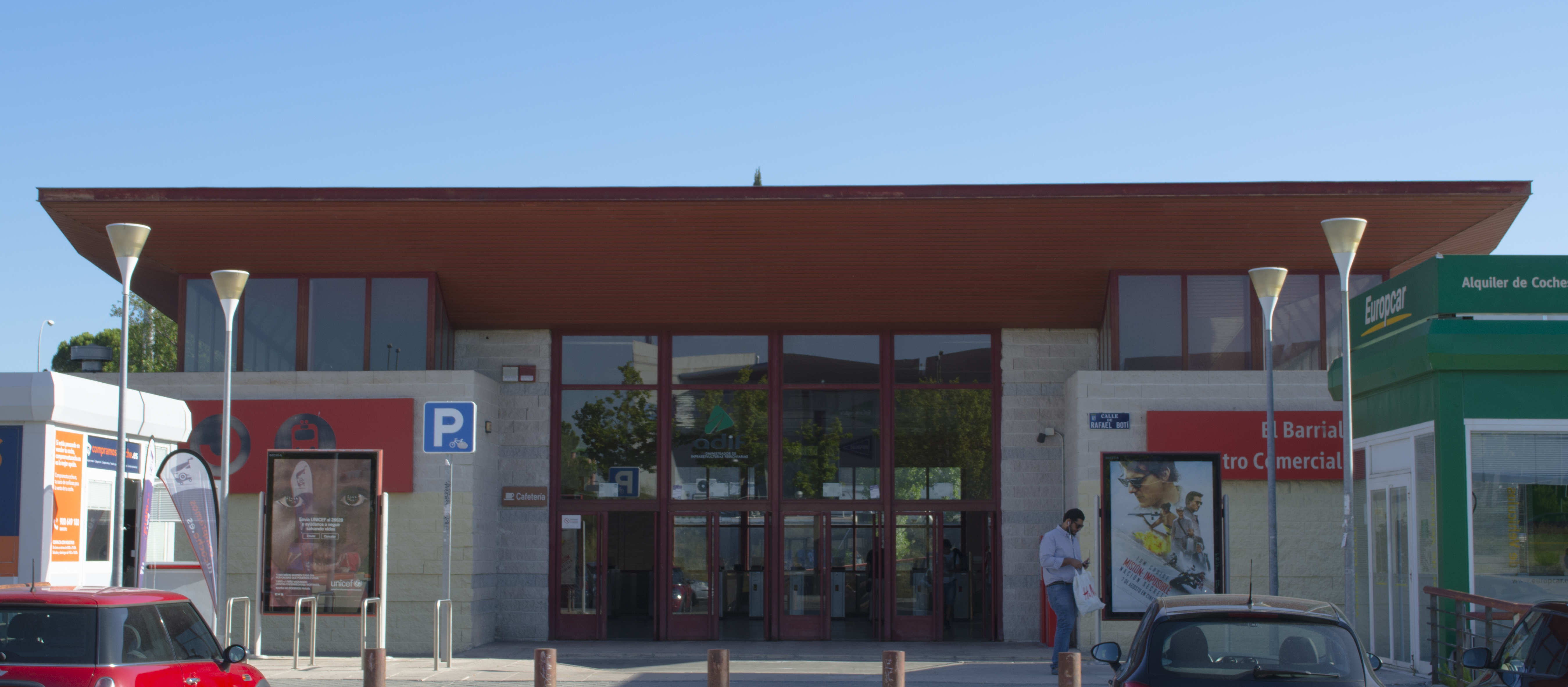 Entrada de la estación El Barrial - Centro Comercial Pozuelo (Madrid).